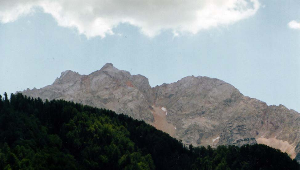 Jezerska Kočna - 2540 m z údolí Kokry